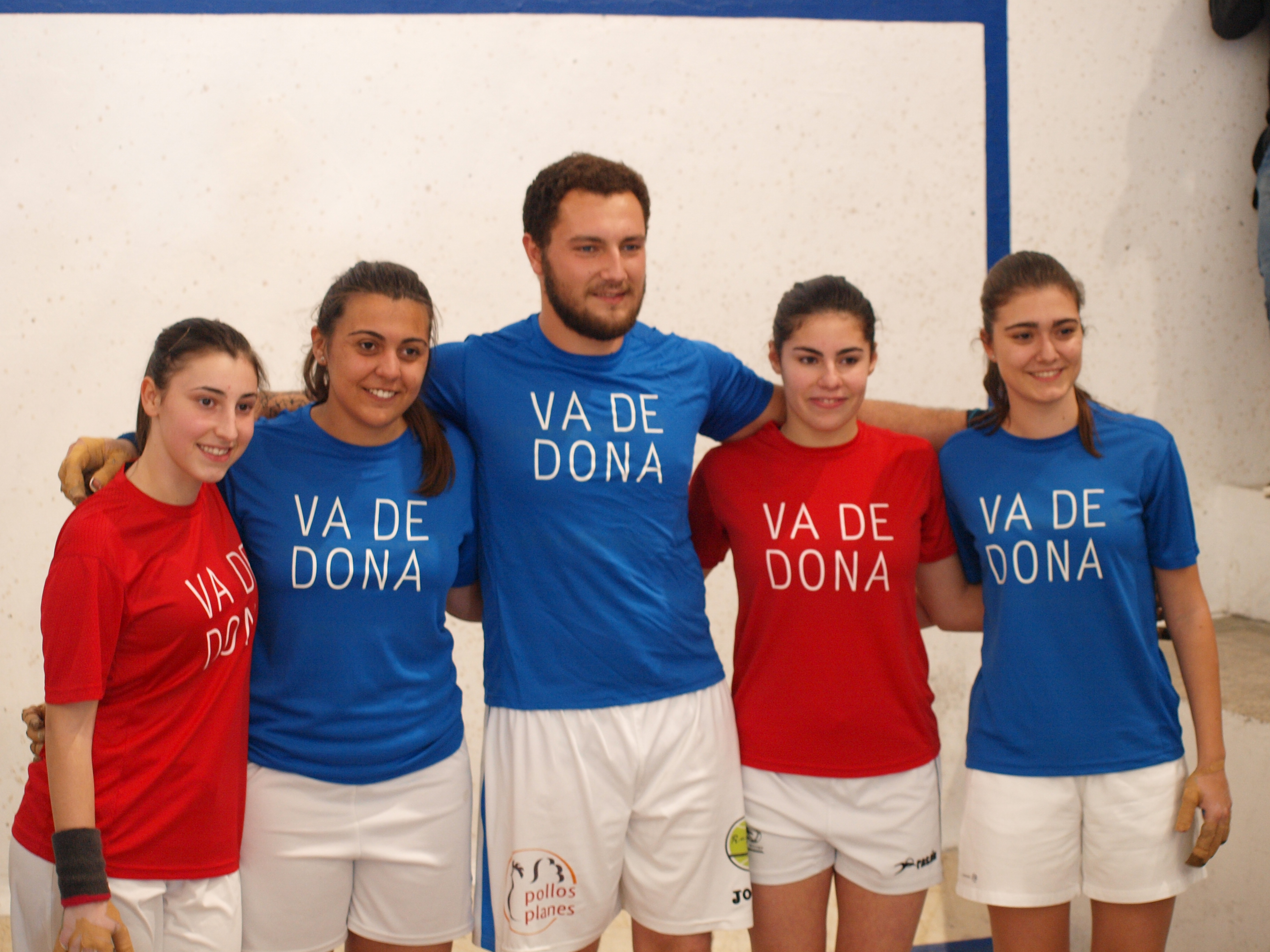 Va de Dona, jornada especial de Raspall femení i mixt organitzada per la FPV al Trinquet de Pelayo.Amparo, Myriam, Jaume Sanchis, Mar i Ana.